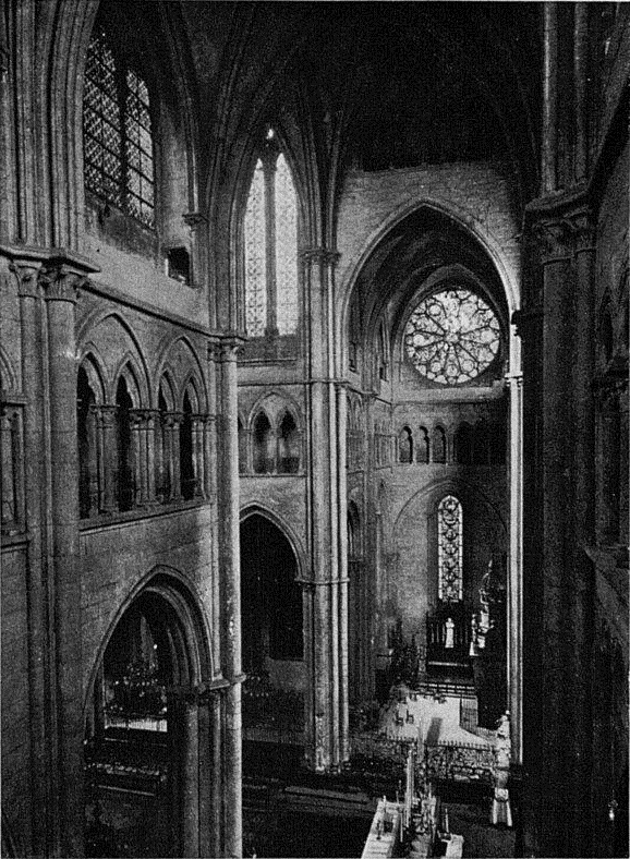 Transept de la primatiale de Lyon, photographie de Lucien Bégule prise depuis le triforium, du sud (transept droit) vers le nord (transept gauche).